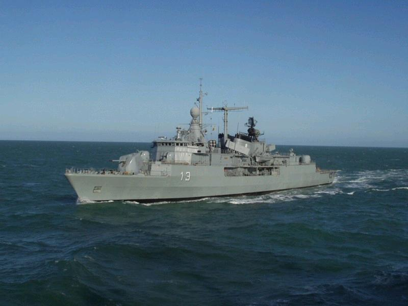 Destructor ARA Sarandí Santiago Aversa Mar Argentino July 2004